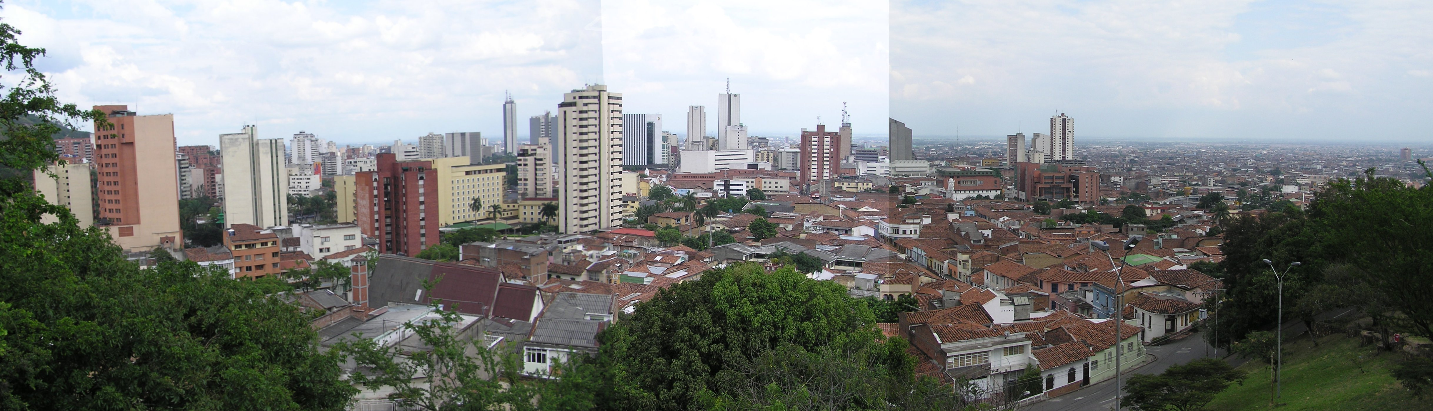 Panoramica de Cali desde San Antonio